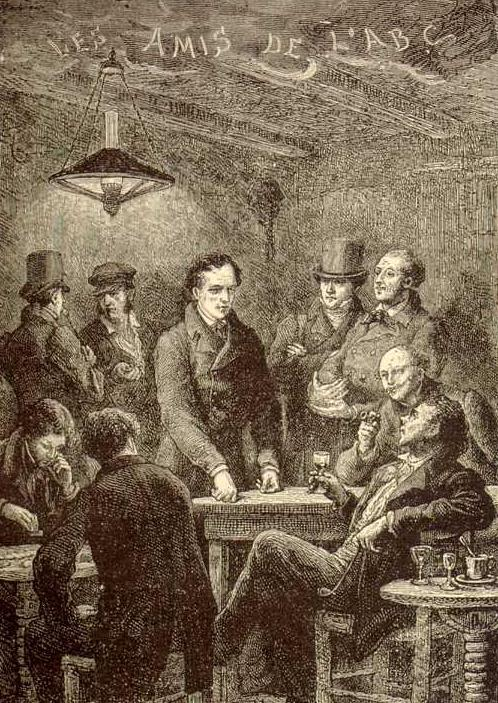 Reunião dos Amigos do ABC.